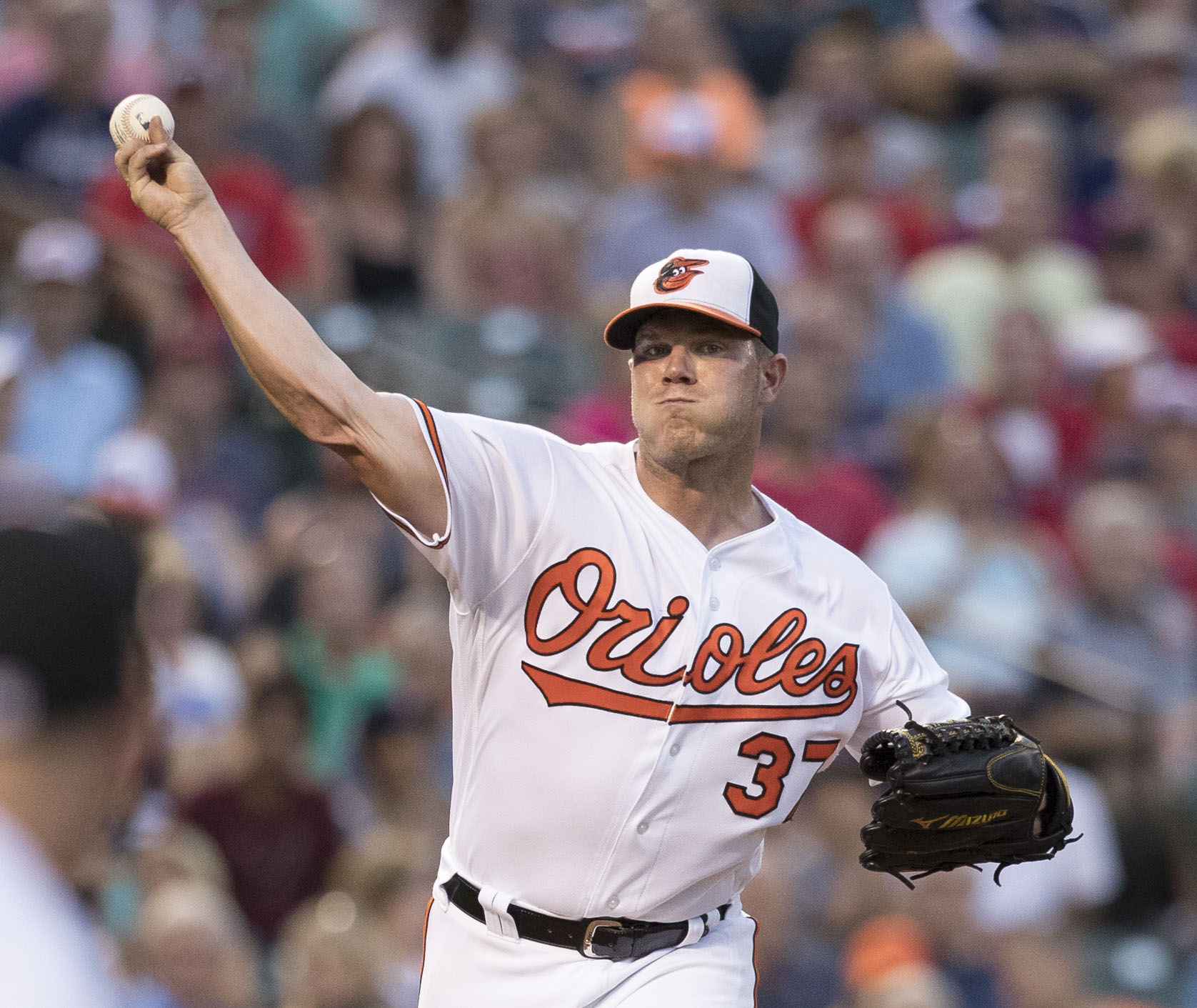 Dylan Bundy